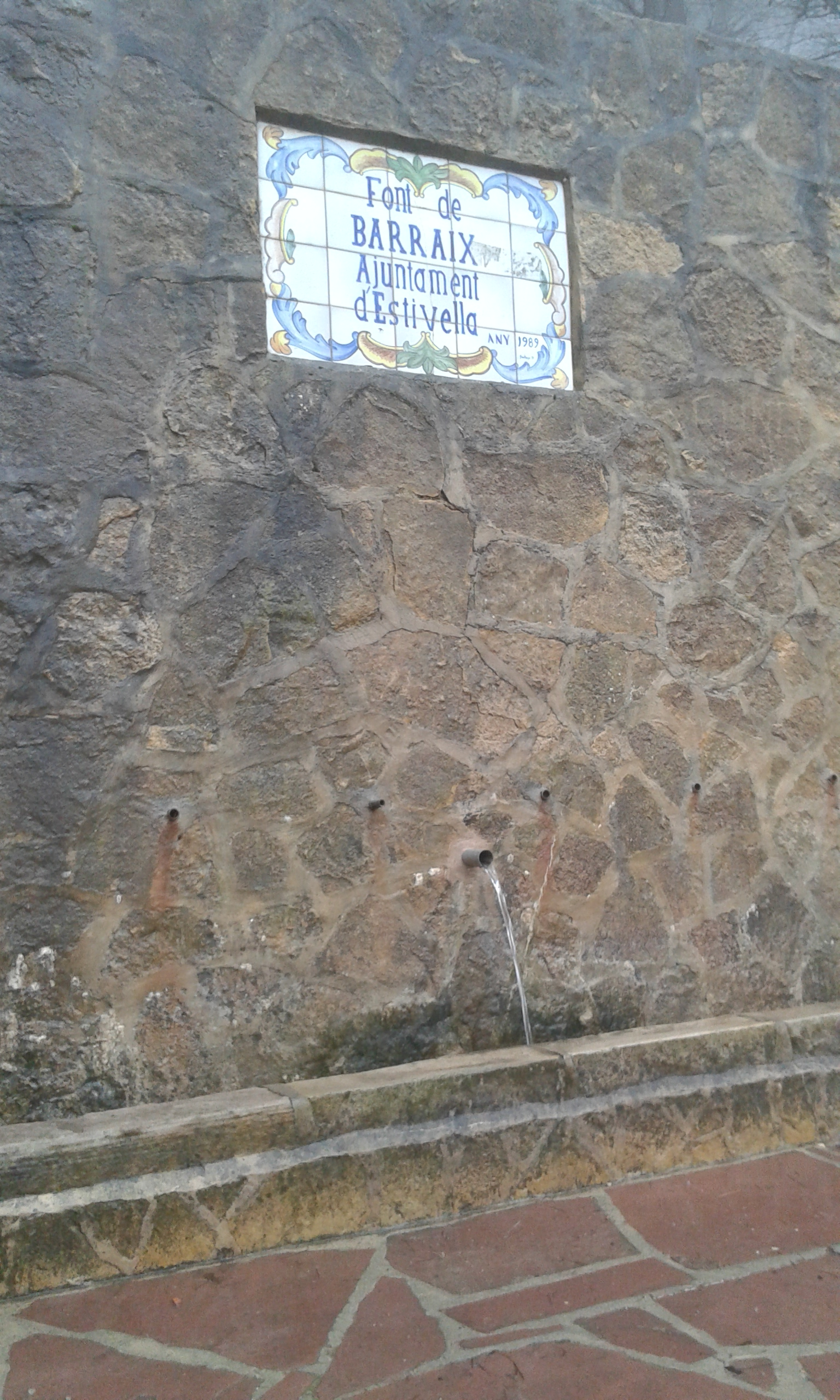 Font de Barraix a Estivella. Serra Calderona després de pluges fortes